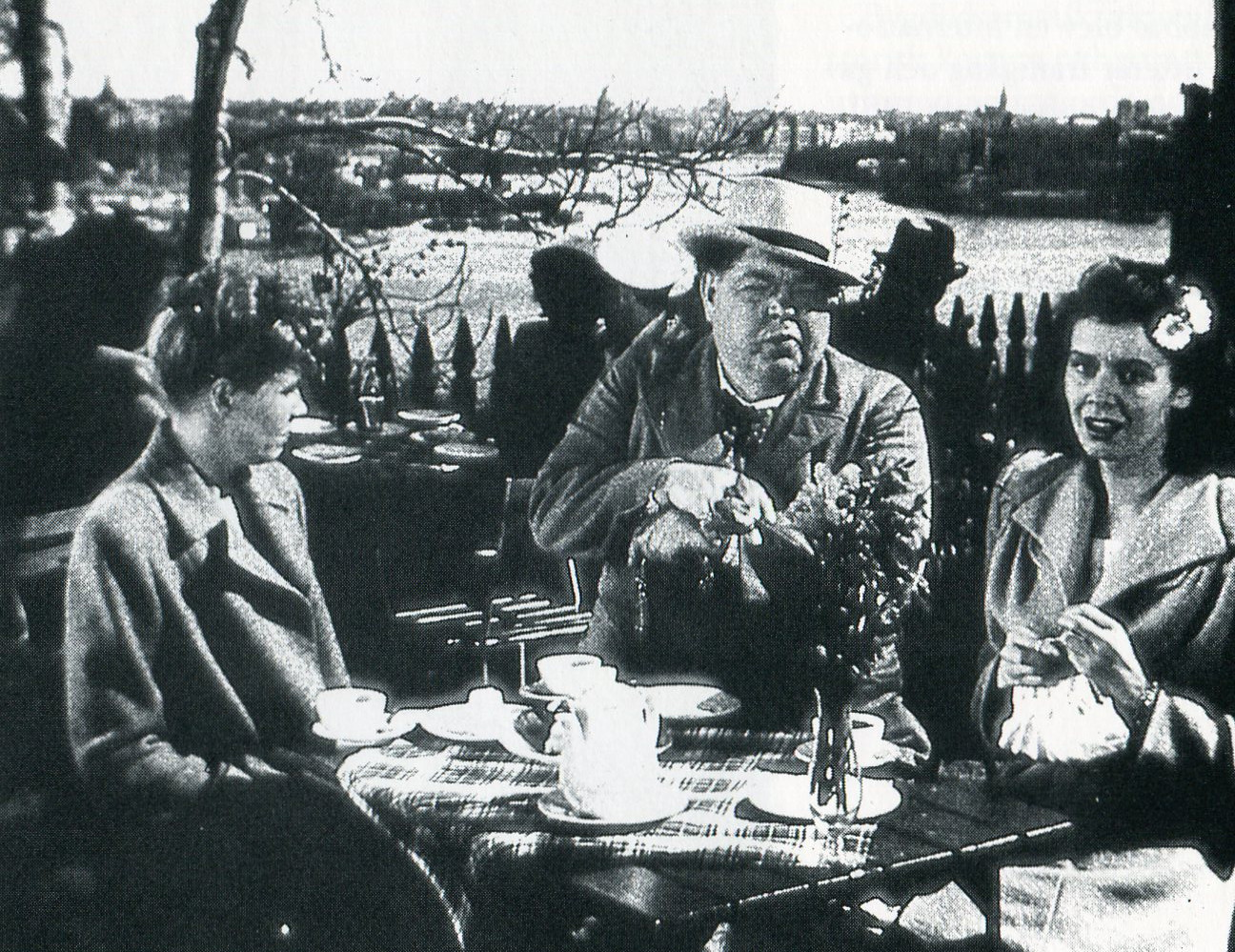 Första svenska långfilm i färg: "Klockorna i Gamla sta'n" (1946) med Elsie Albiin, Edvard Persson och Ulla Wikander